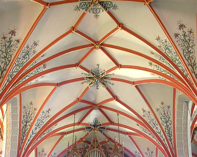 Pfarrkirche St. Anna (Waal bei Landsberg am Lech, Landkreis Ostallgäu, Bayerisch-Schwaben). Langhaus. Das Gewölbe des Mittelschiffes nach Westen. Eigene Aufnahme, Juli 2007 / Parish church St. Anne (Waal near Landsberg am Lech, Bavaria, Germany). Nave. The vaulting of the central aisle, looking west. Own photo, July 2007